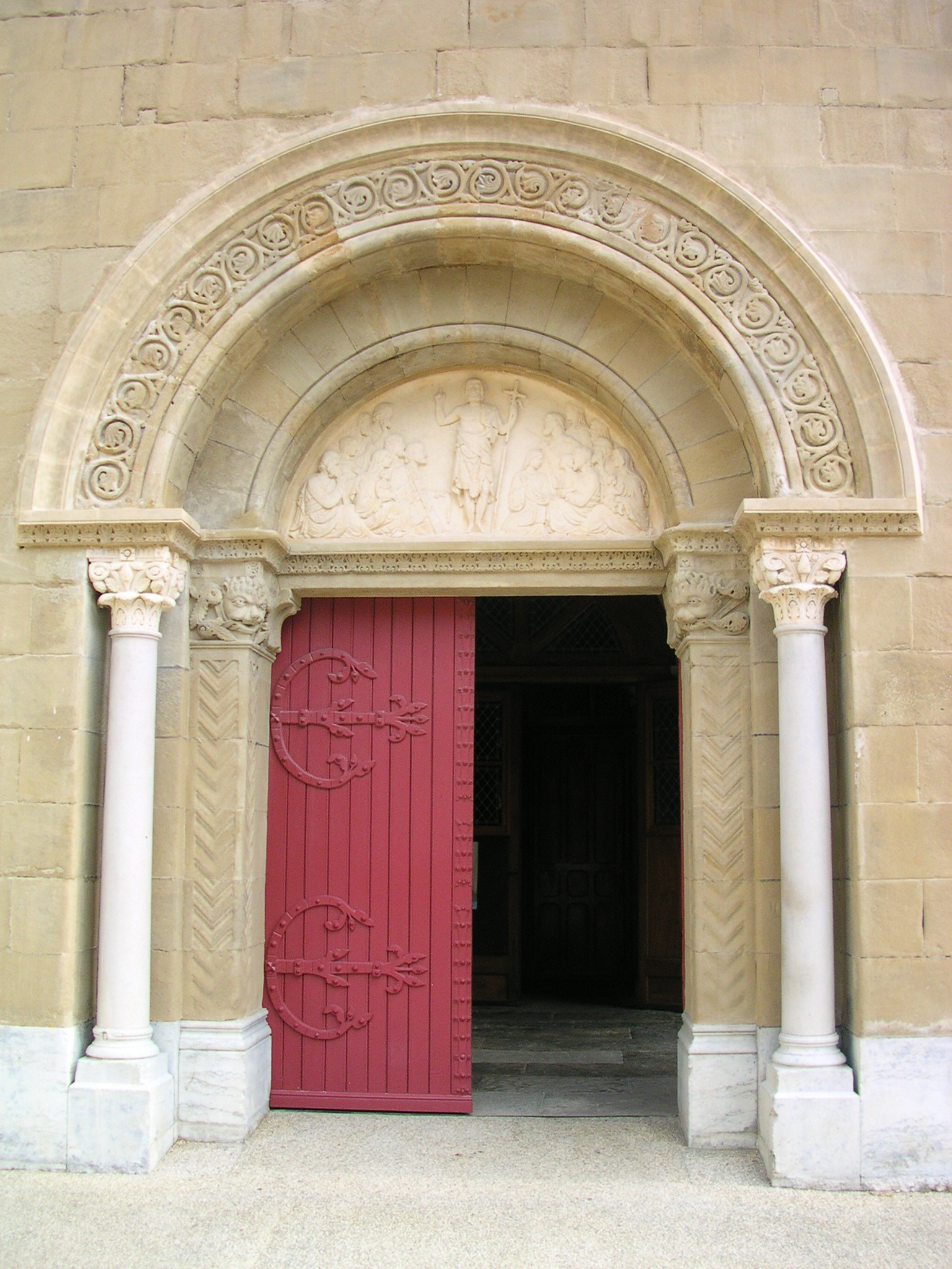 église Saint-Jean-Baptiste (Valence,Drôme)France